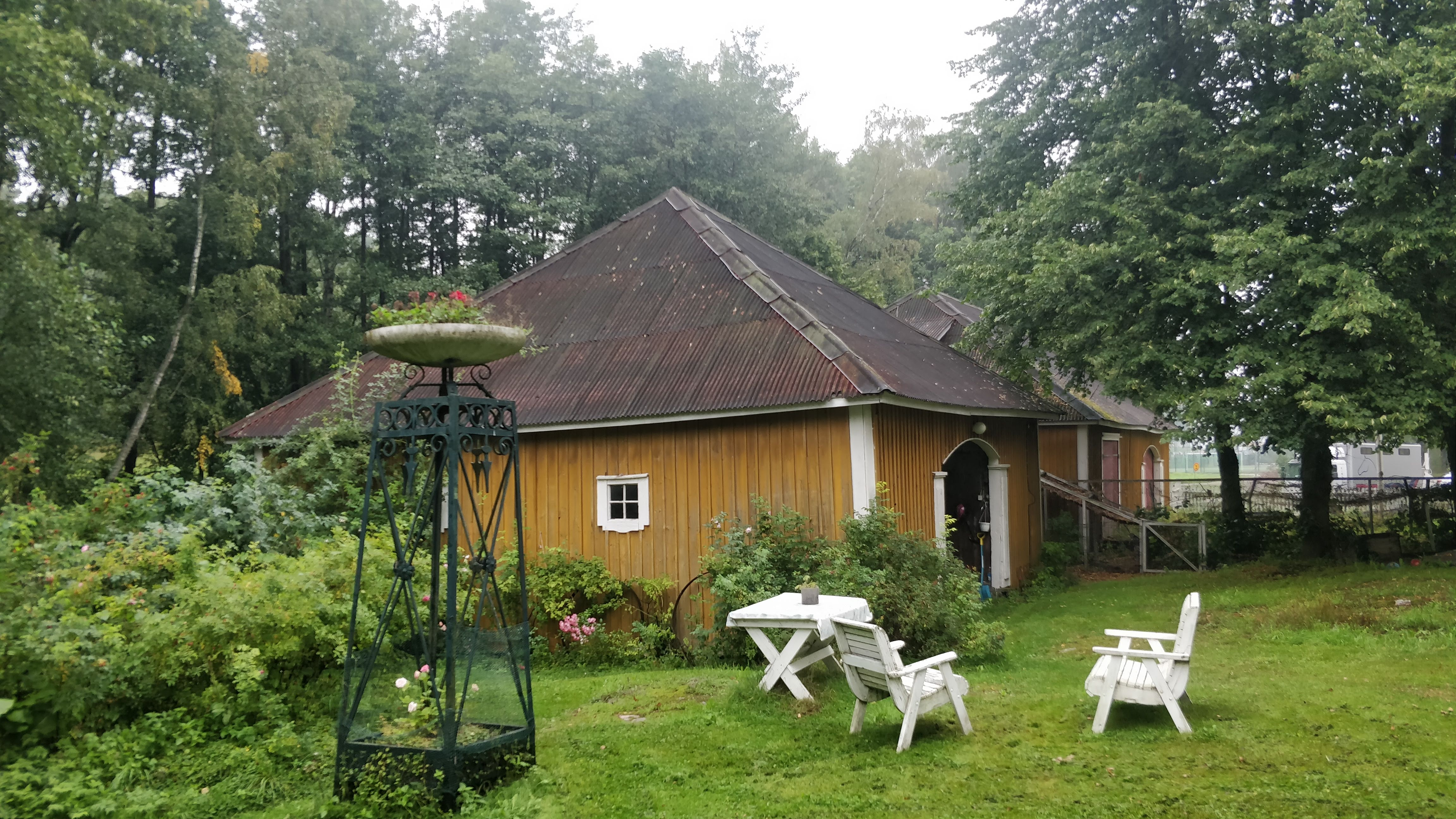 Soukanpohjan kartanon sivurakennuksia